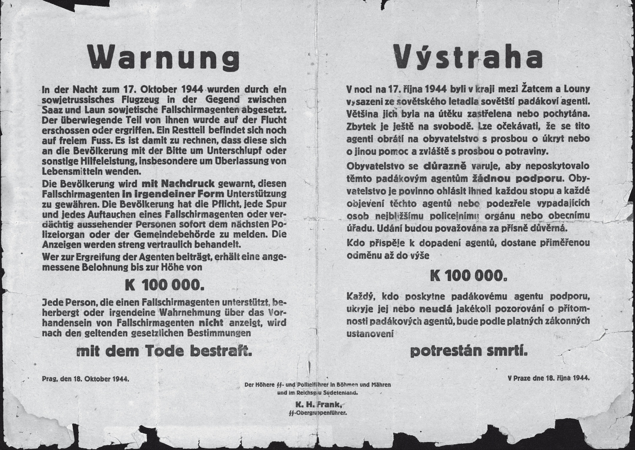 Výstraha vydaná protektorátními úřady po seskoku skupiny Vasila Kiše (paravýsadek - desant: JAN KOZINA) v říjnu roku 1944, H8-17343